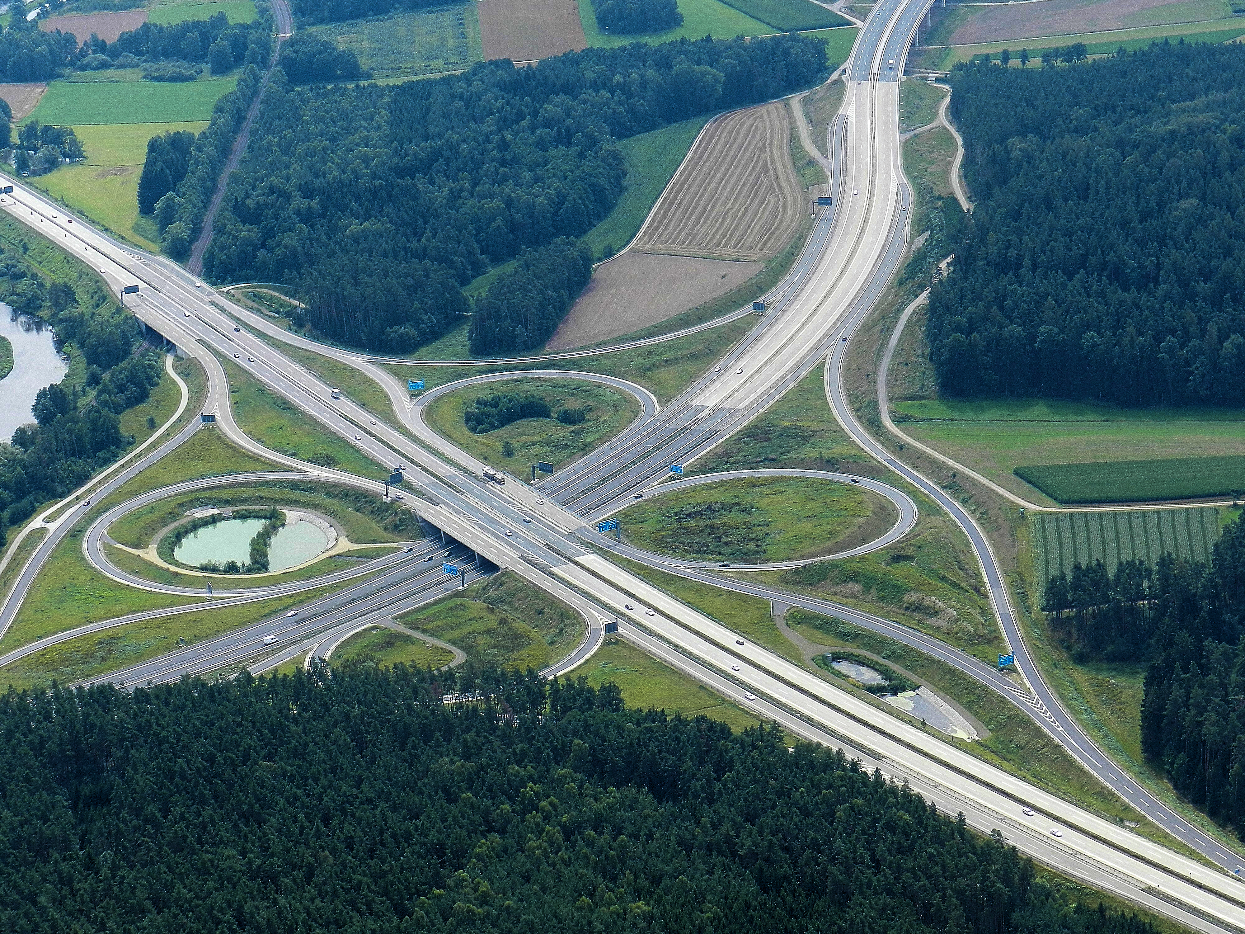 Autobahnkreuz "Oberpfälzer Wald", Schnittpunkt der A 93 und der A6 (von links nach rechts) zwischen Wernberg Köblitz im Norden und der Stadt Pfreimd im Süden, am linken Bildrand ist der Fluss Naab zu sehen: Landkreis Schwandorf, Oberpfalz, Bayern (2011)